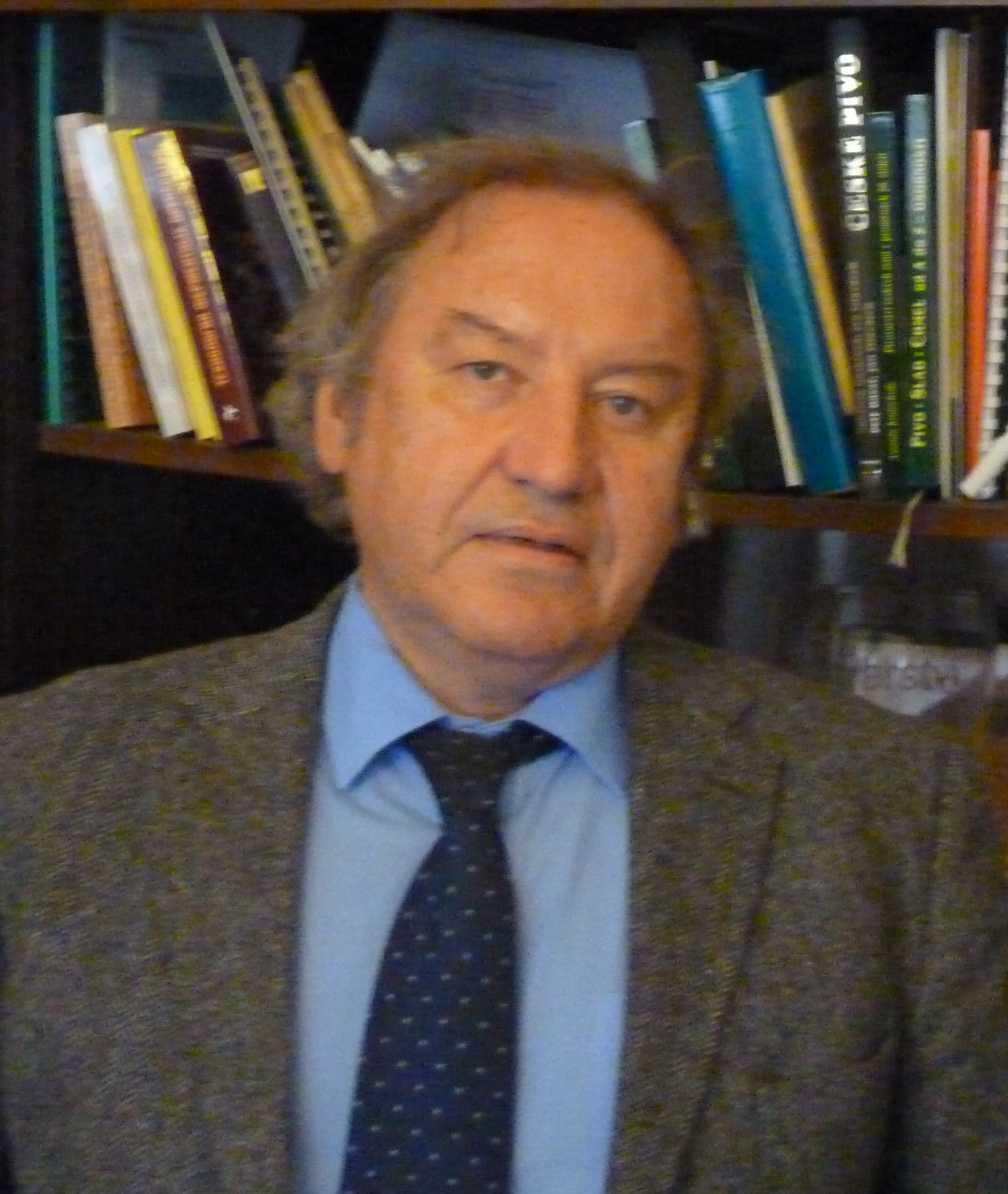 Karel Kosař, scientist from beer and malt industry